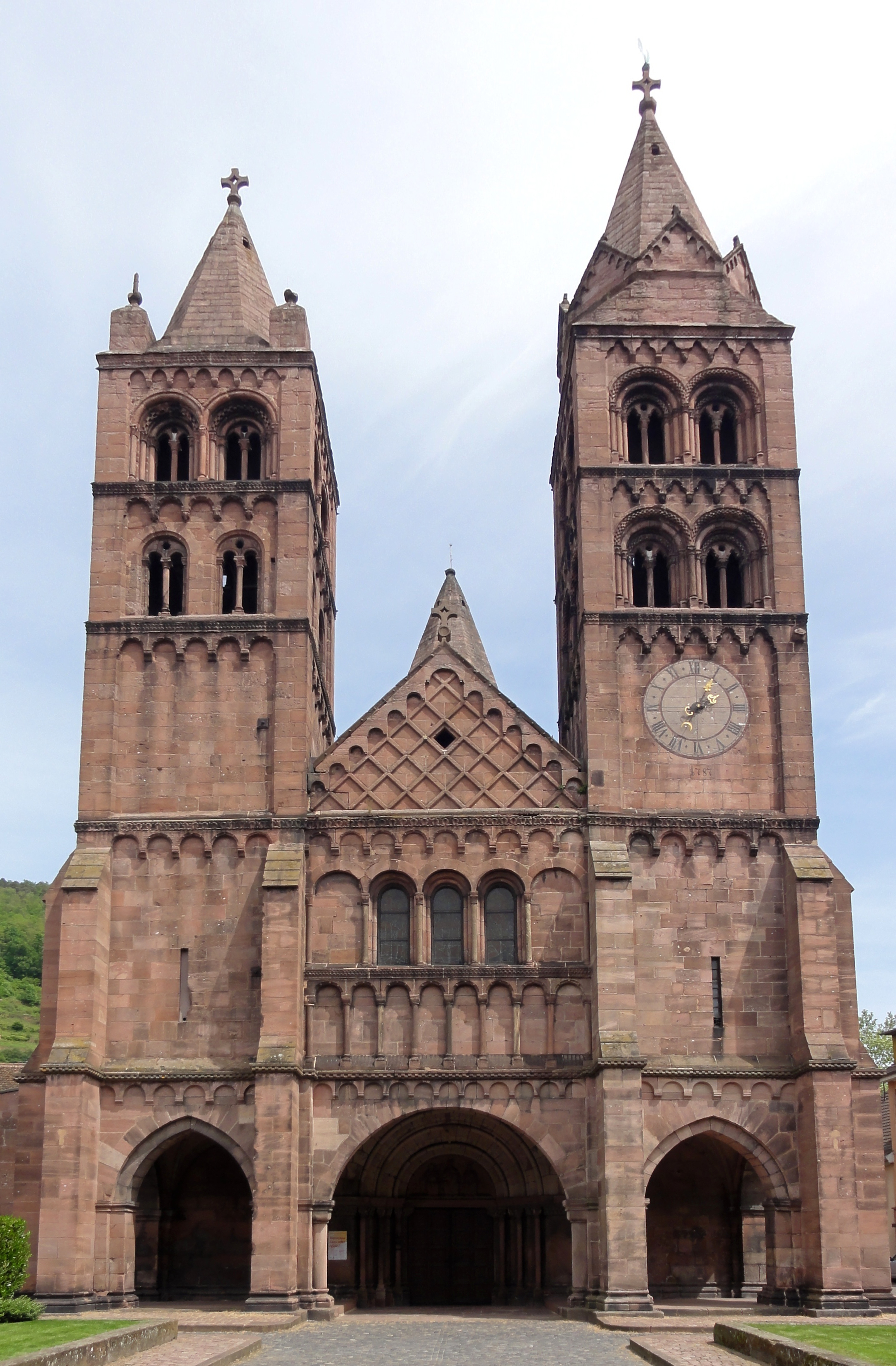 Alsace, Haut-Rhin, Église Saint-Léger (XIIIe) de Guebwiller (PA00085440, IA00054831).